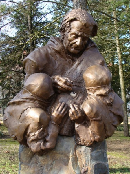 Kettesy Aladár szobra, Debrecen, 2009. Györfi Sándor szobrász alkotása.